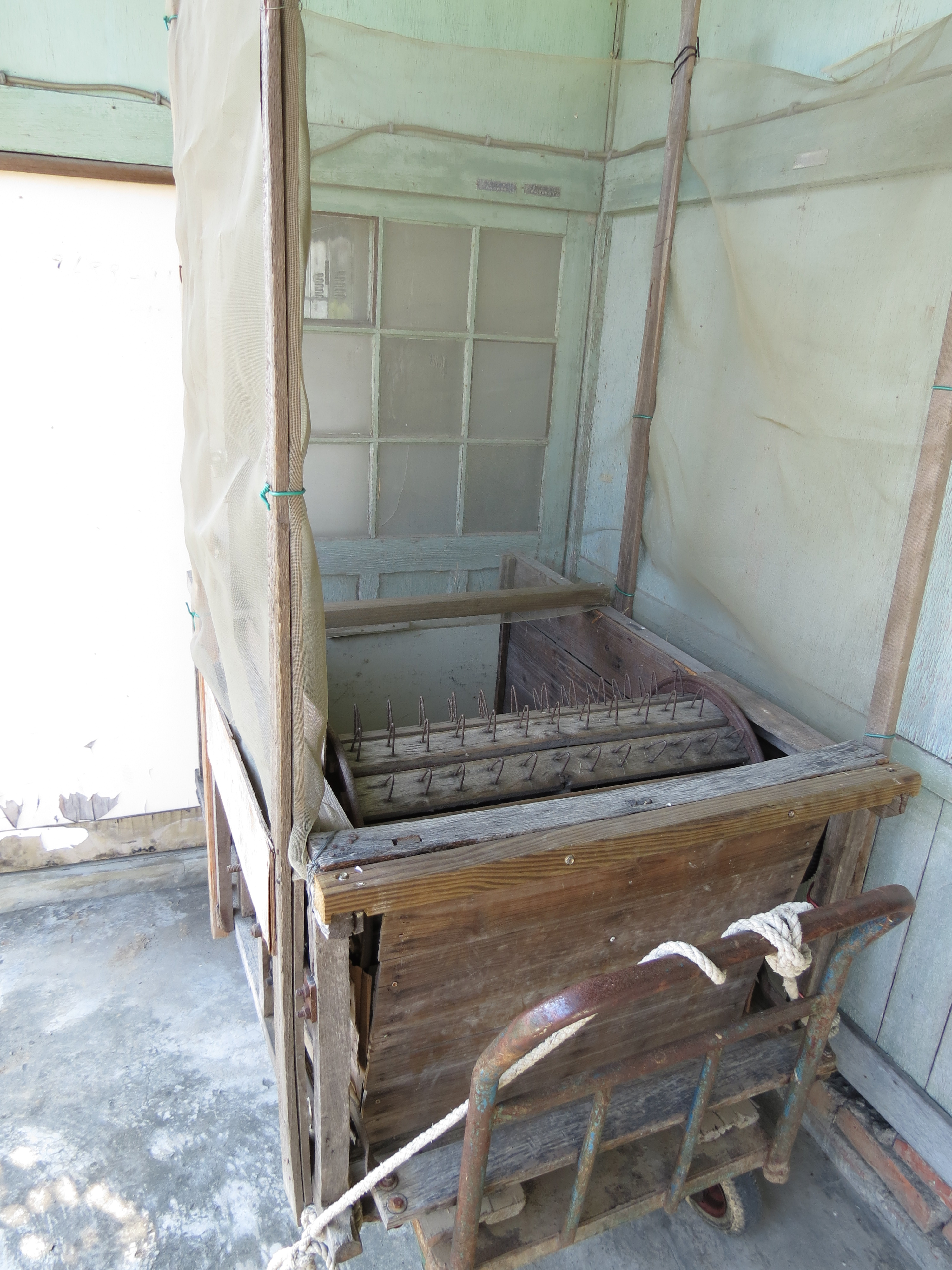 中文（台灣）: 臺大磯小屋外展出的農具（打穀機）。Bân-lâm-gú: 佇臺大舊農林作業室外口展出的農具（機器桶）。